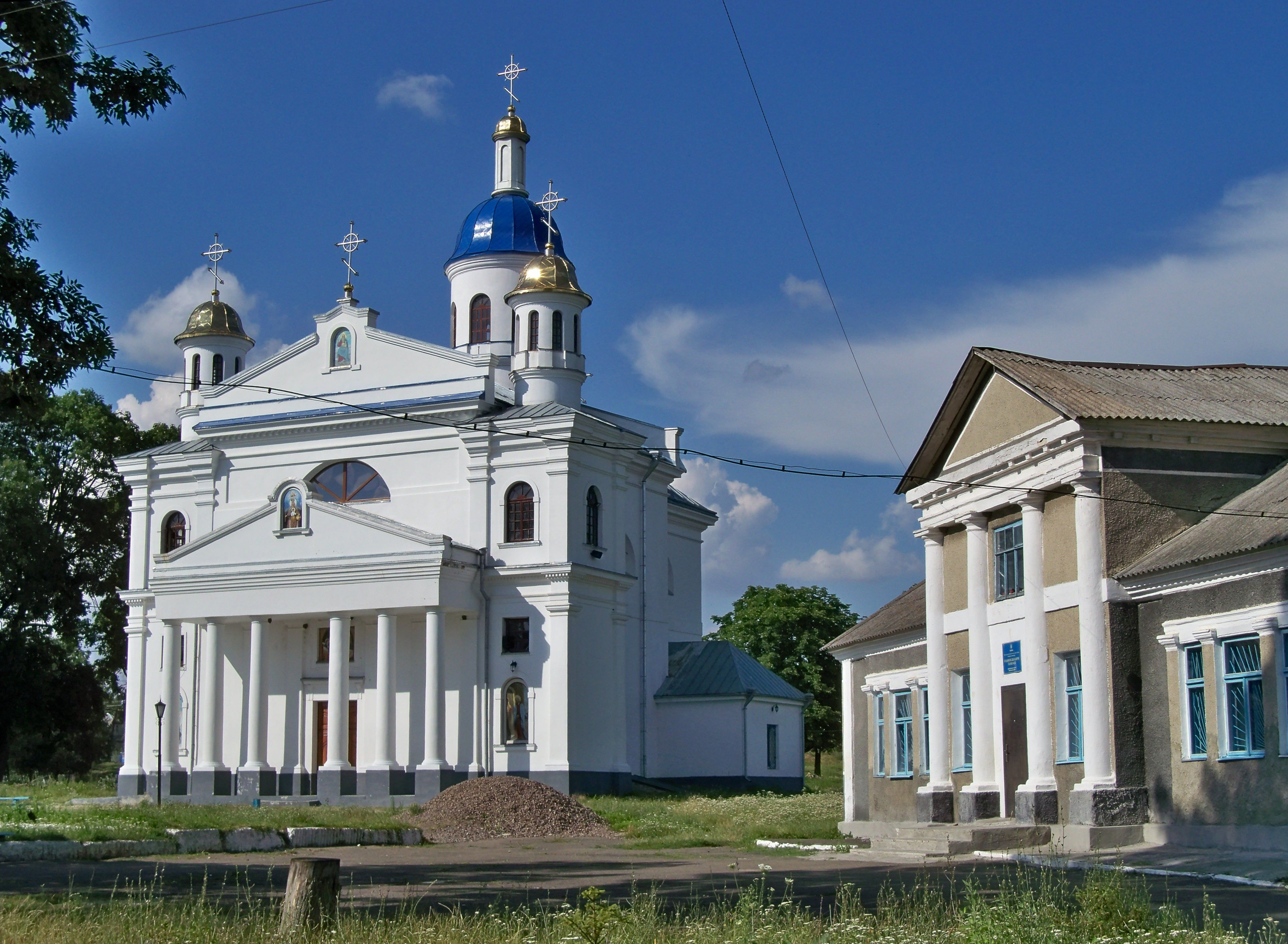 Парафіяльний костел (мур.), смт Мізоч